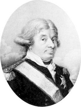 Carl Vilhelm Modée född 31 mars 1735 troligen i Stockholm, död 12 oktober 1798 i Hasslöv, Hall. Var en svensk konteramiral och överståthållare. Modée blev överståthållare i Stockholm 29 november 1792 och amiral och överkommendant i Karlskrona 23 december 1793.